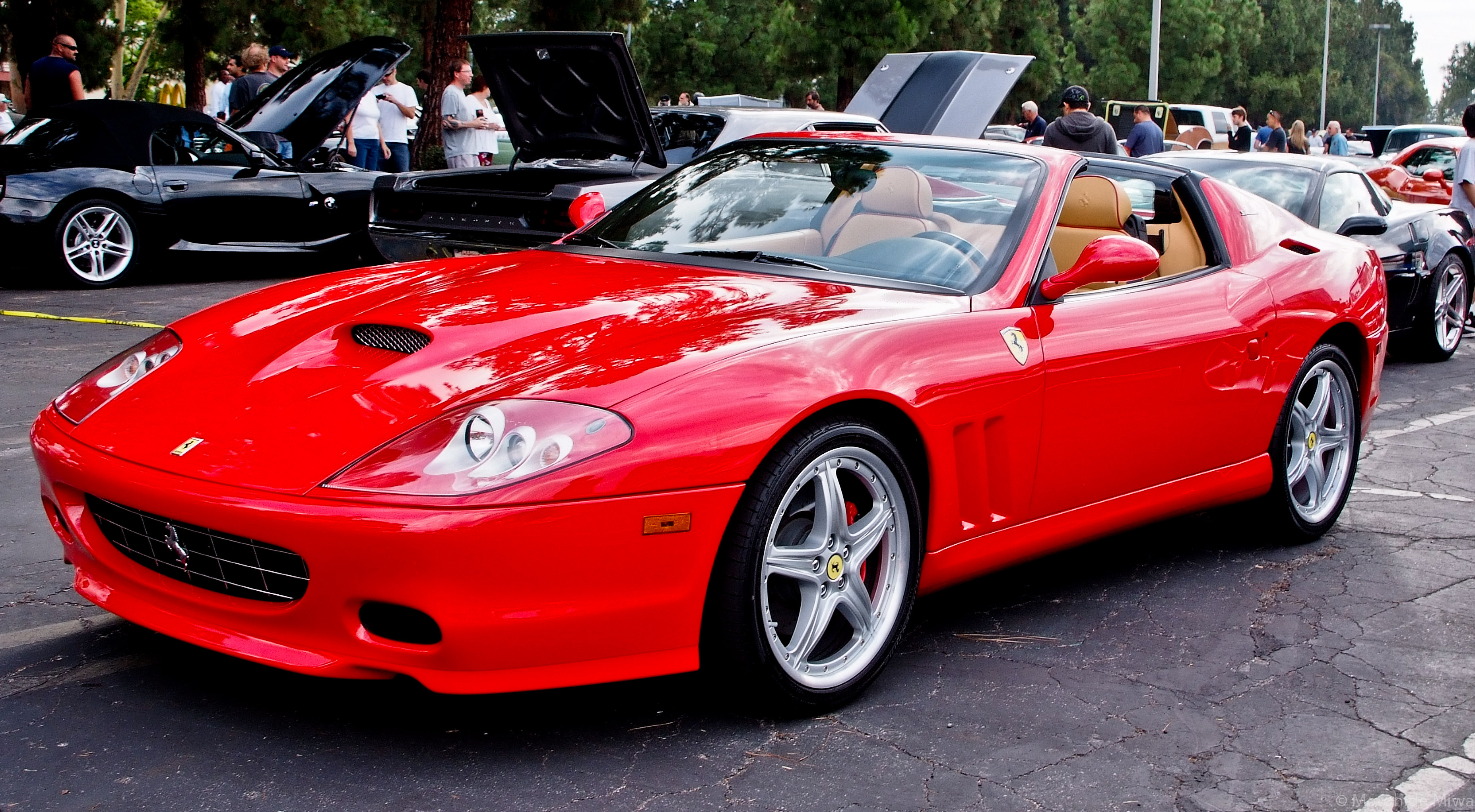 SupercarSunday-61